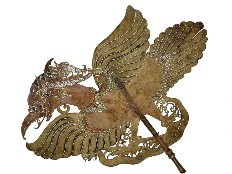 Wajangfiguur. Wajangfiguur van karbouwenhuid, de mythische vogel Garuda voorstellend Unknown language: wayang purwa